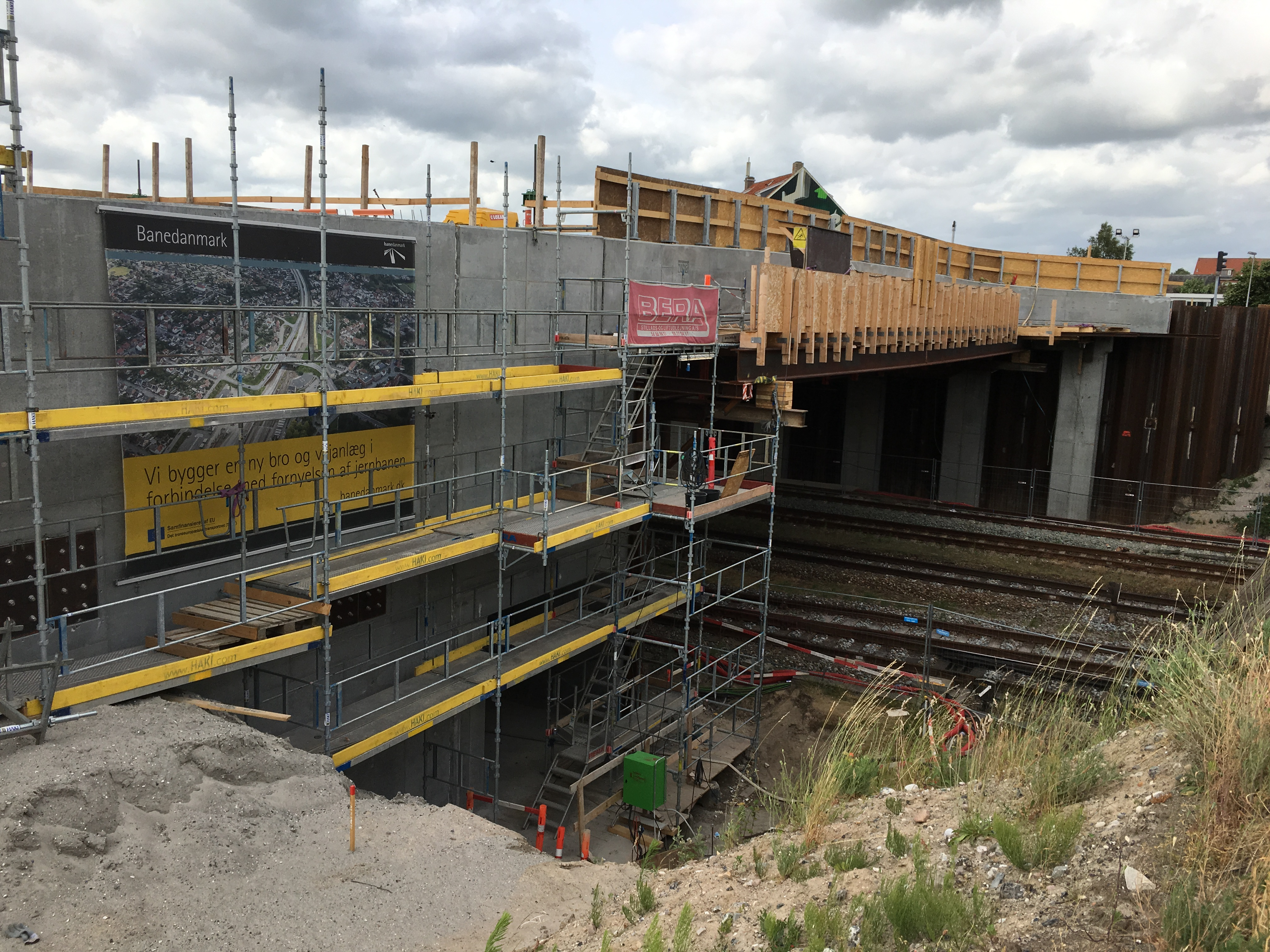 Etablering af ny bro ved Rampen, Næstved i juni 2018.